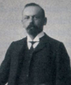 L'oculista basilese Theodor von Speyr, morto nel febbraio del 1918, padre della mistica Adrienne von Speyr.